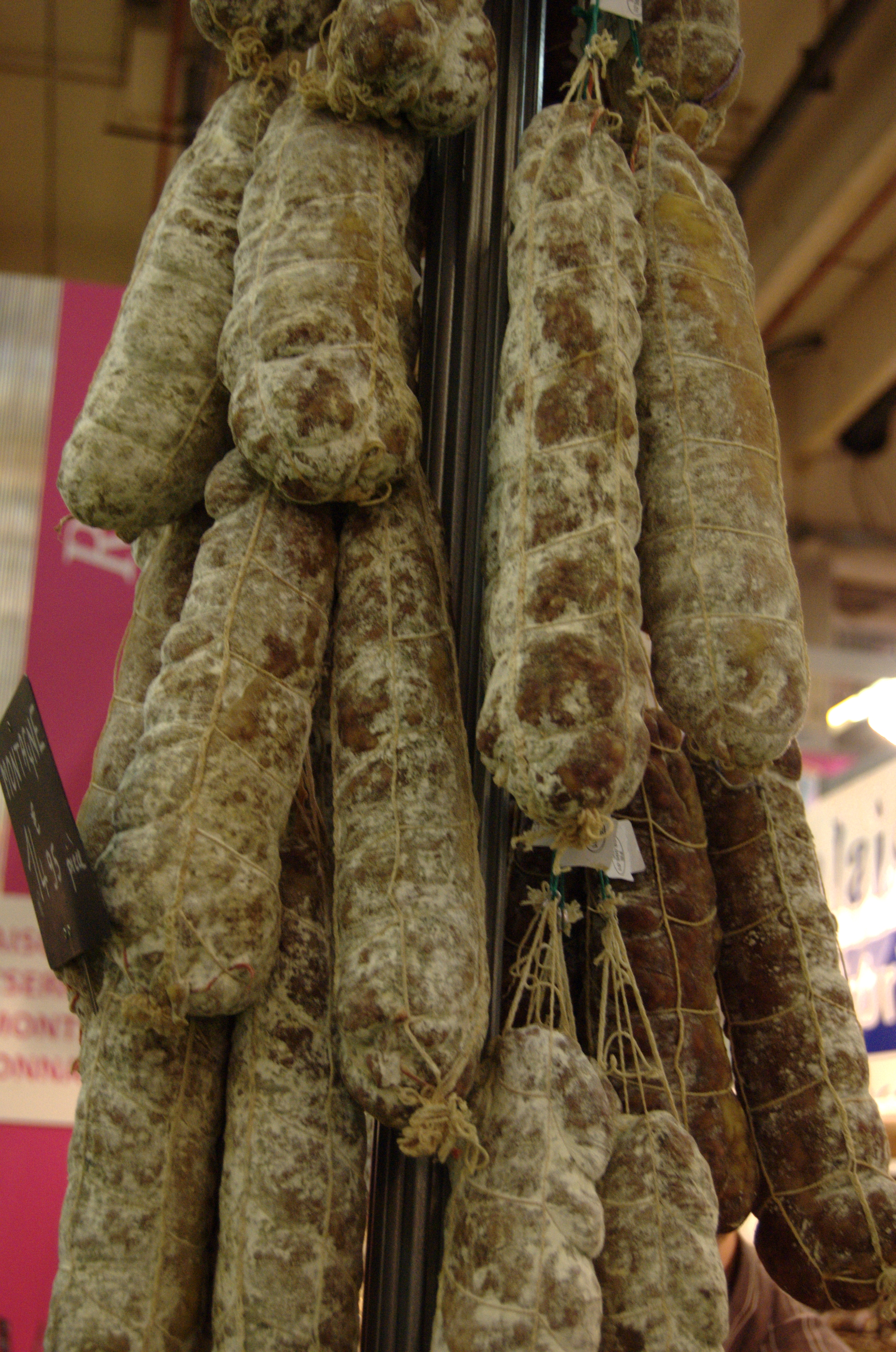 Saucissons - Salon international de l'agriculture 2009 - 22 février 2009.